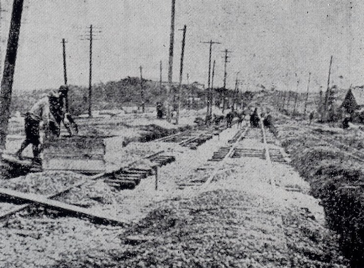 覚王山線複線化工事 （大正15年1月31日付け名古屋新聞）